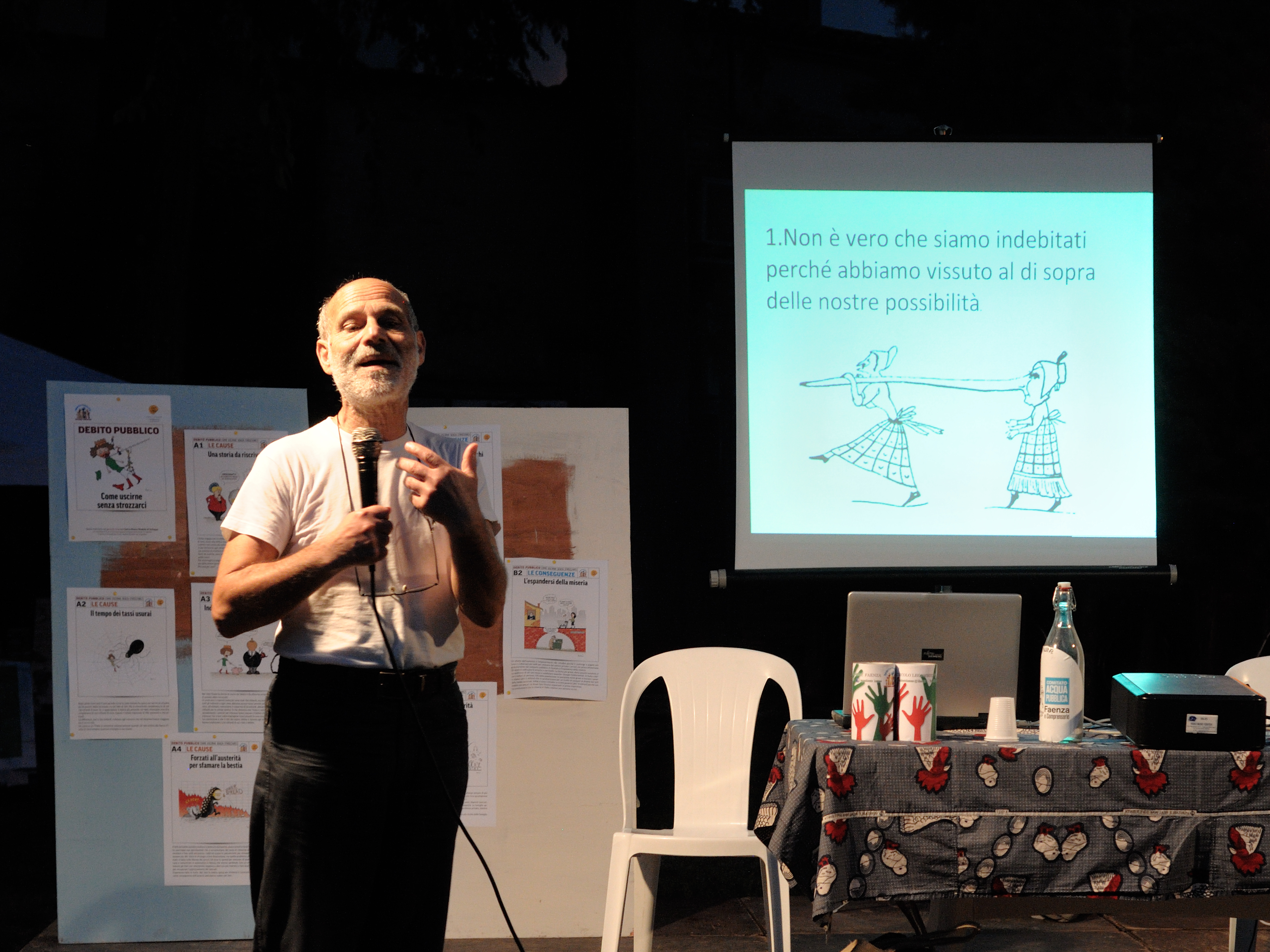 Francesco Gesualdi durante la campagna “Debito pubblico: decido anch’io!”